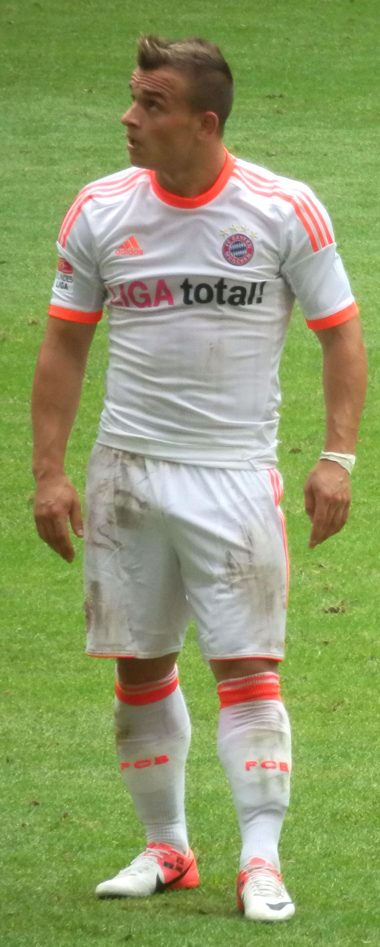 Xherdan Shaqiri im Bayern Away Trikot (Liga total! Cup 2012, Hamburg)